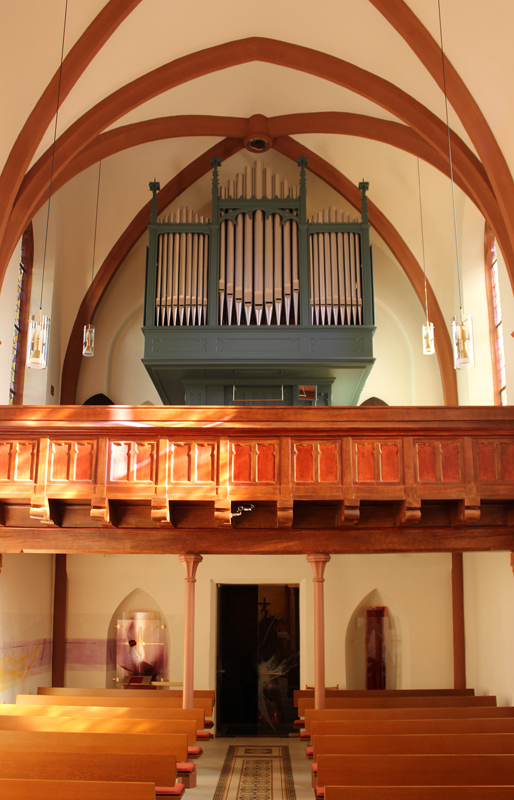 Blick ins Innere der evangelischen Kirche in Merzig, Landkreis Merzig-Wadern, Saarland. Die Kirche wurde in den Jahren 1863–65 nach Plänen von Carl Friedrich Müller (* 14. Juni 1833 in Hersfeld; † 1. August 1889 ebd.) errichtet.